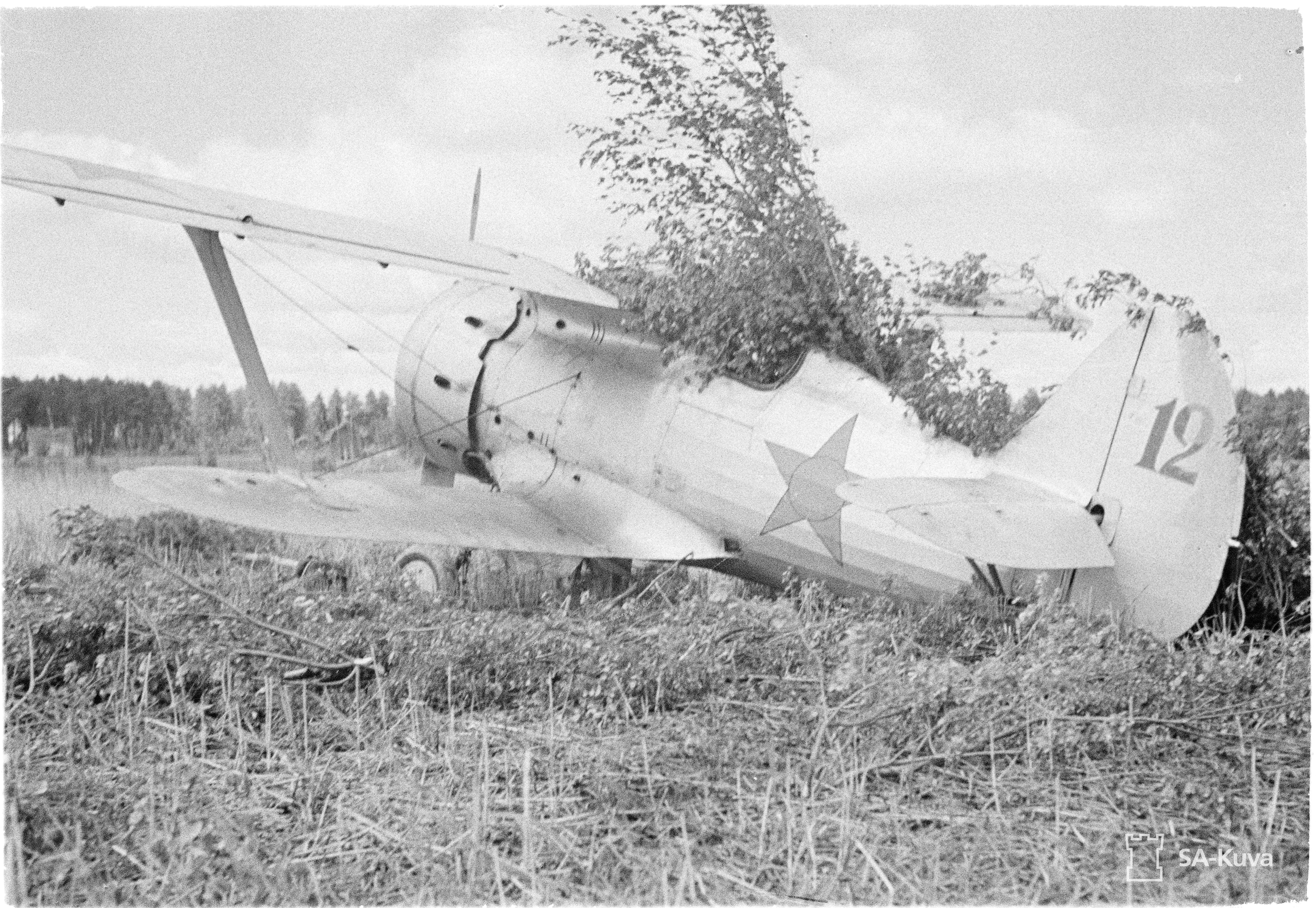 Venäläinen pakkolaskun tehnyt hävittäjälentokone. (Kuvassa on Polikarpov I-153) Kuvauspaikka: Simpele, Kerimäki k.k.